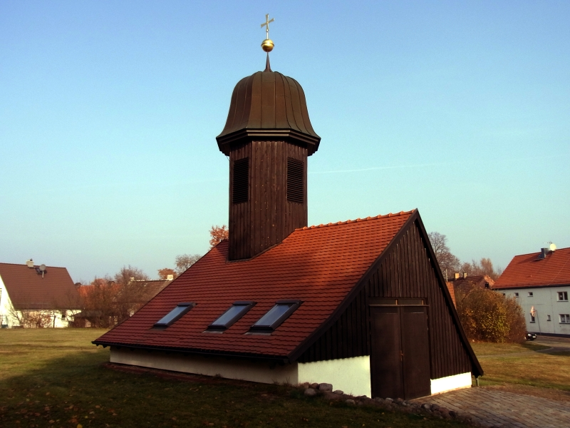 Der Nachbau wurde zur Erinnerung an die durch den Tagebau Jänschwalde abgebrochene Klinger Kirche im Nachbarort Gosda errichtet.